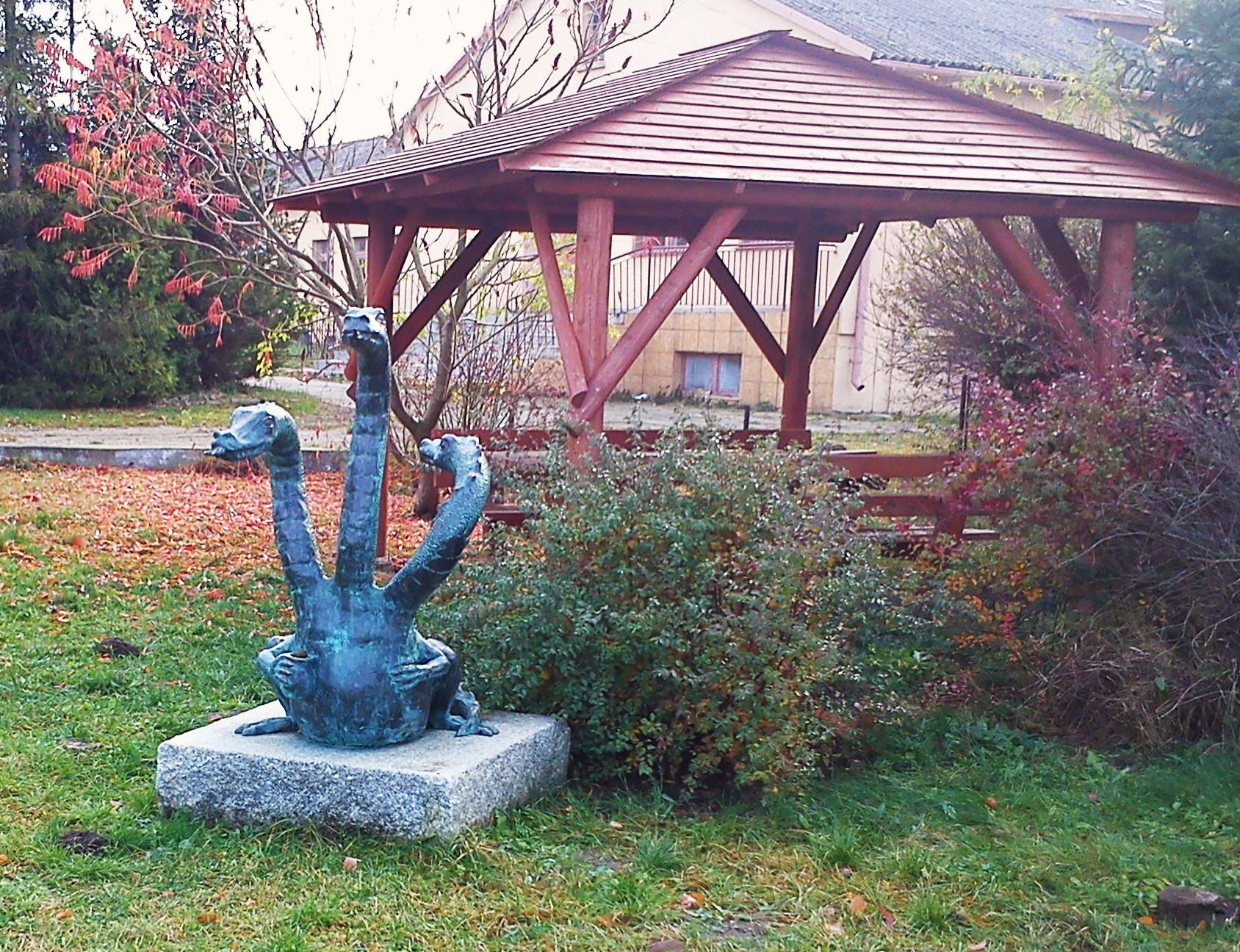 Pomnik smoka drachowskiego w Drachowie.